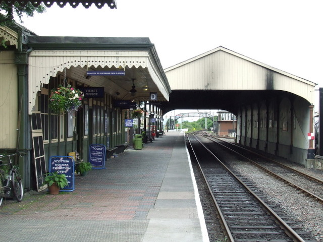 Bo'ness station